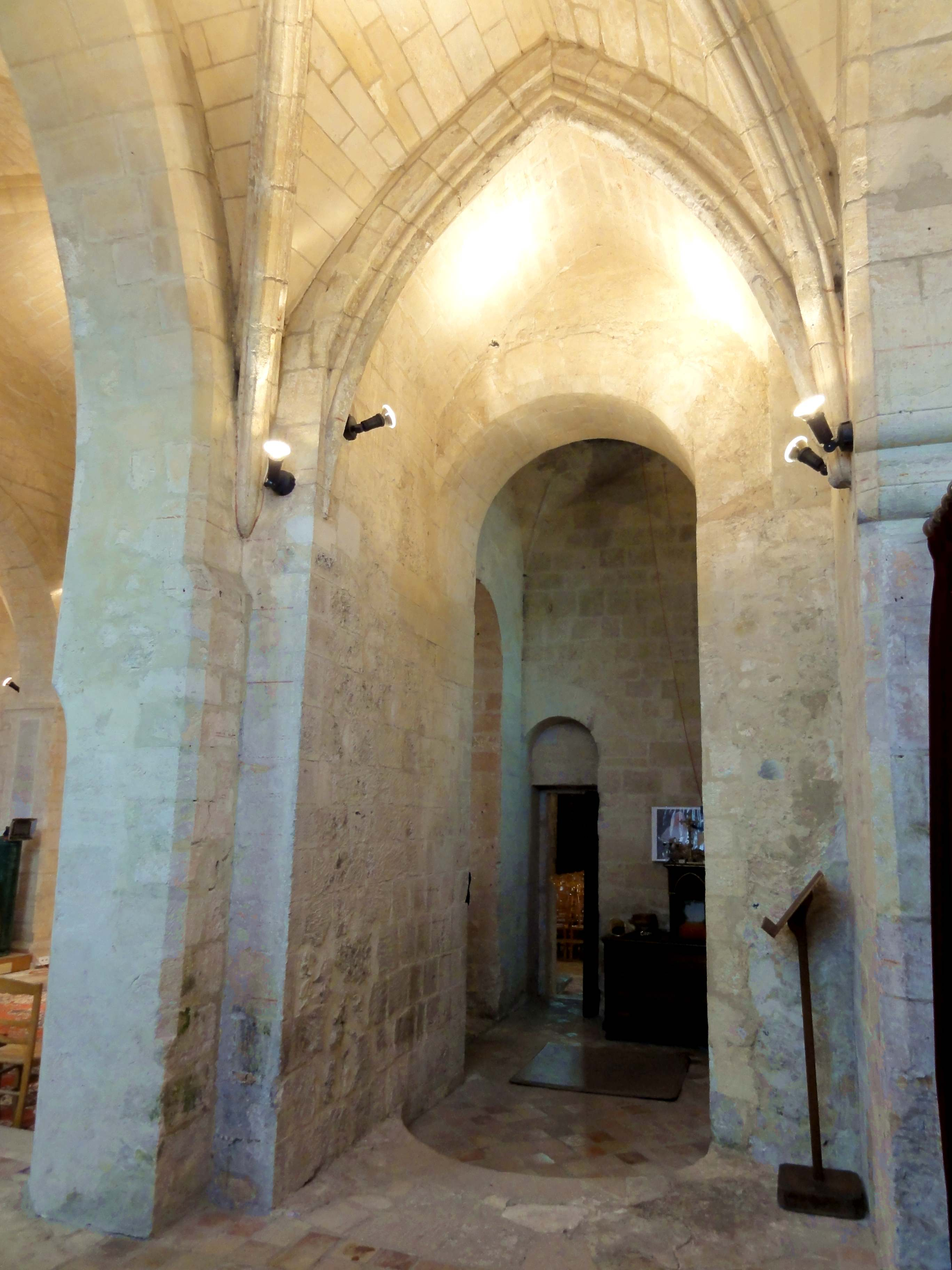 Chapelle nord, vue vers l'ouest dans la base du clocher.